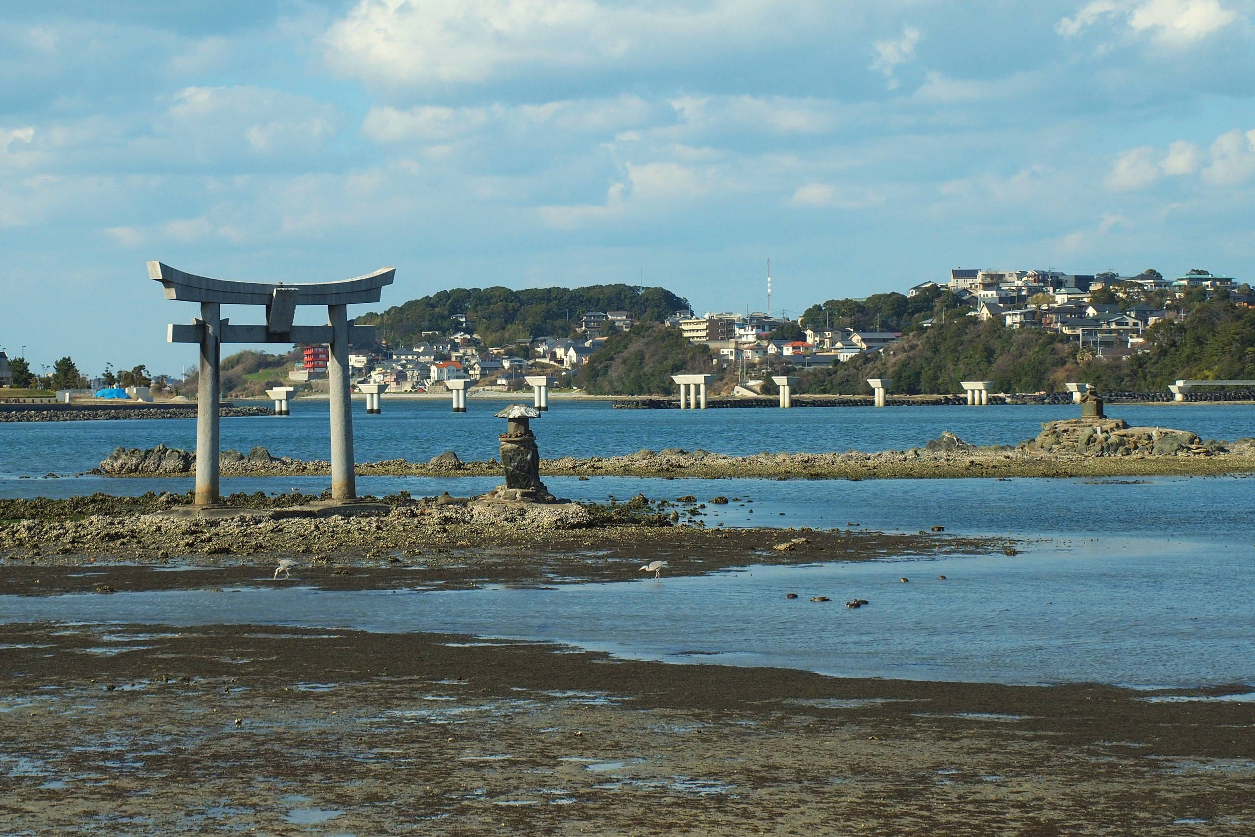 福岡市東区にある御島神社の祠と鳥居。